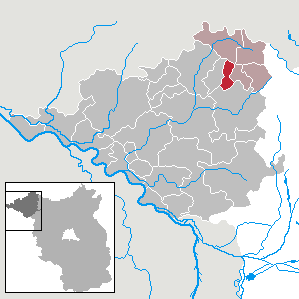 Kümmernitztal in Brandenburg (Country) - District Prignitz